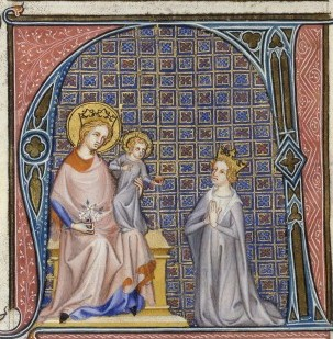 Jeanne de Bourgogne priant